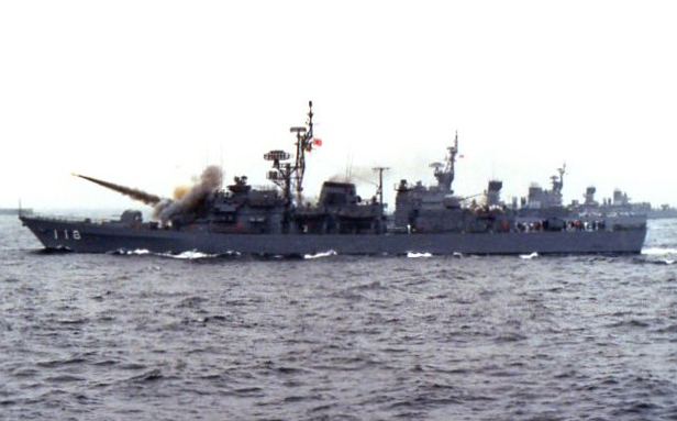 1988年展示訓練に参加時の護衛艦むらくも。